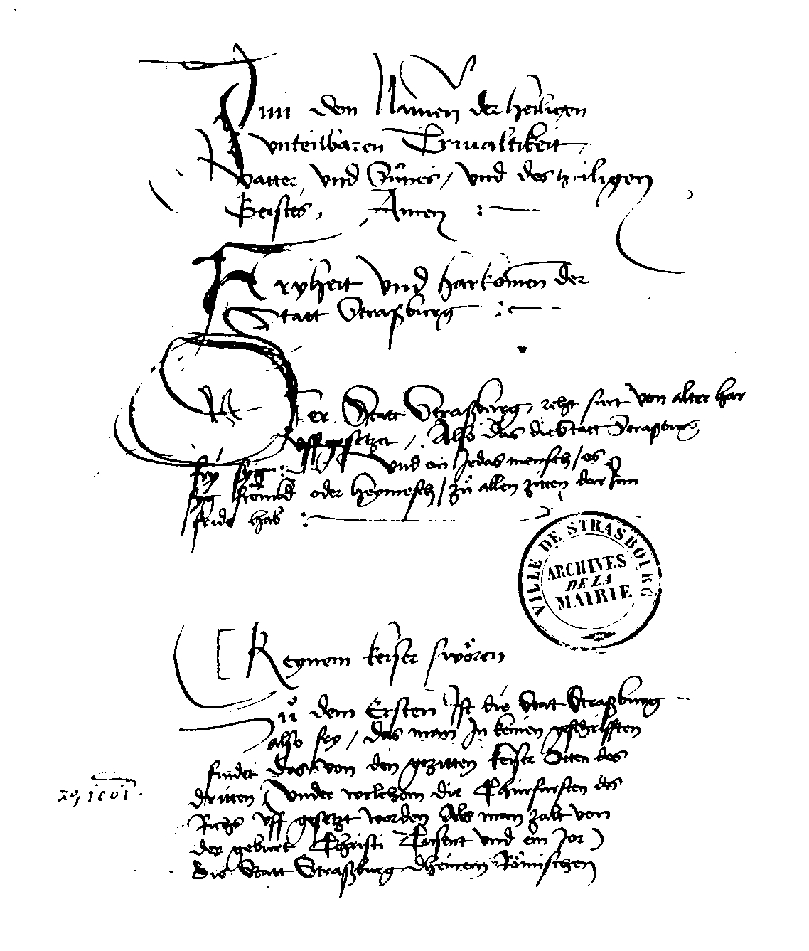 Beginn der Straßburger Freiheiten